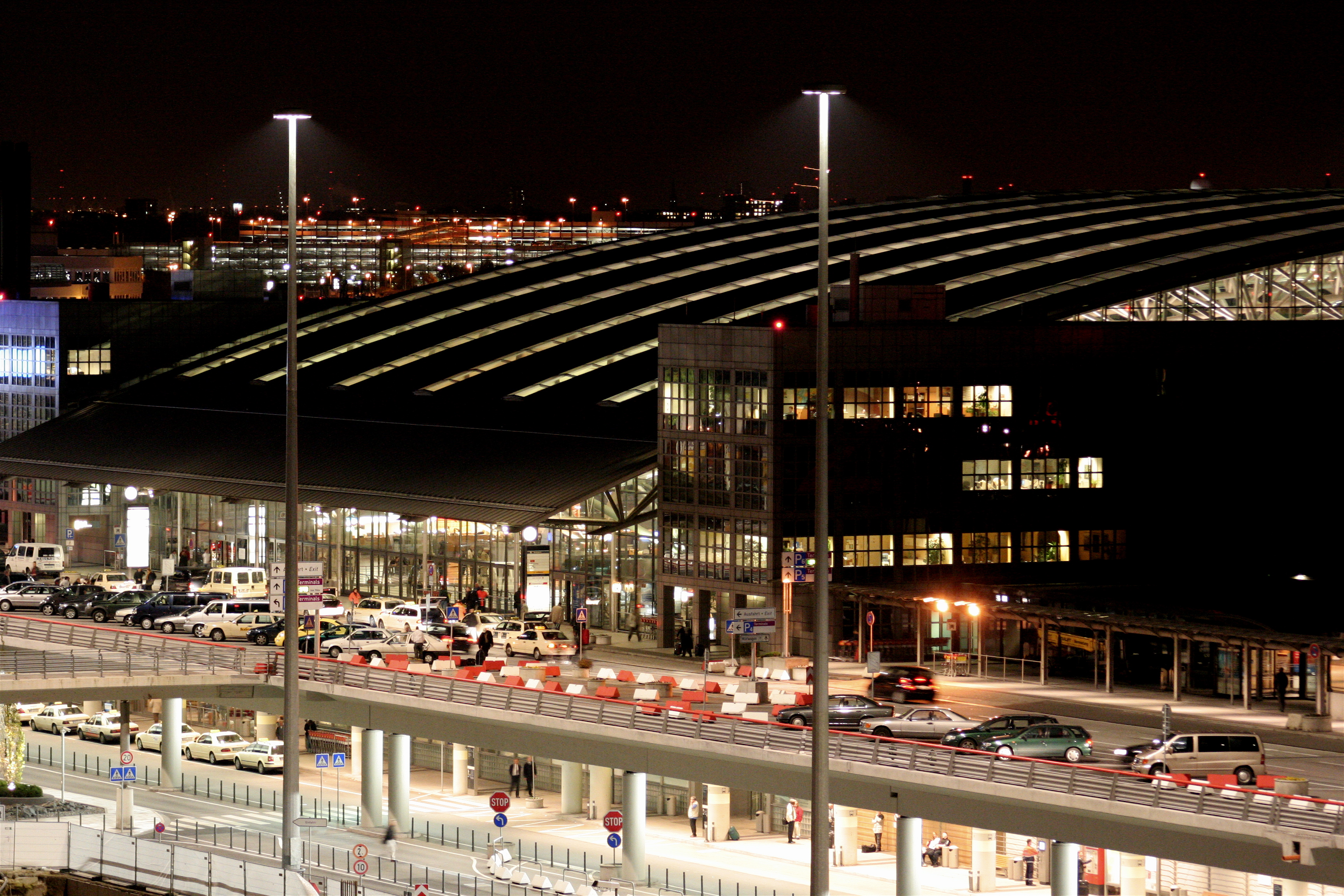 Hamburg: Terminal 1